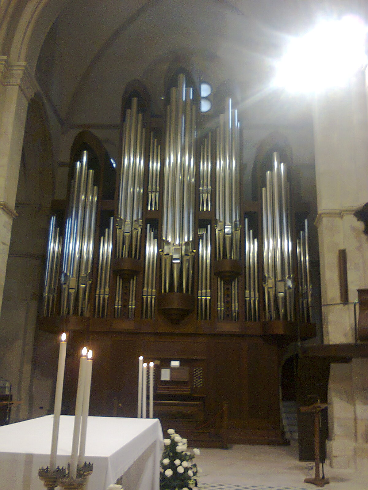 Autore Alfredo Ledonne, foto scattata personalmente l'8 Dicembre 2012, voglio che chiunque usi la foto mi riconosca come autore riportando il nome che ho indicato e che mantenga la stessa licenza per le opere derivate.